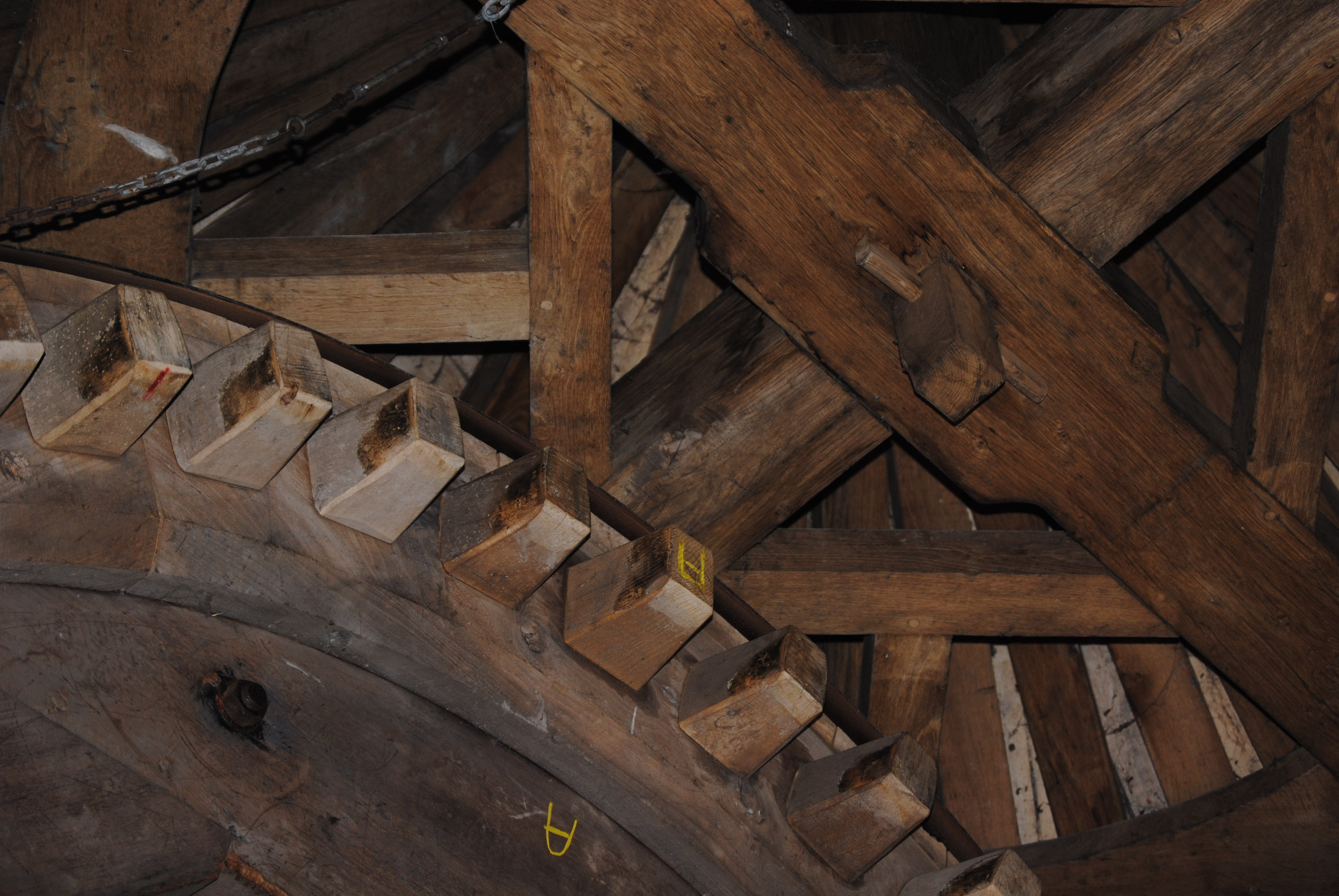 Détail du rouet du moulin à vent Hacart à Achicourt (Pas-de-Calais)